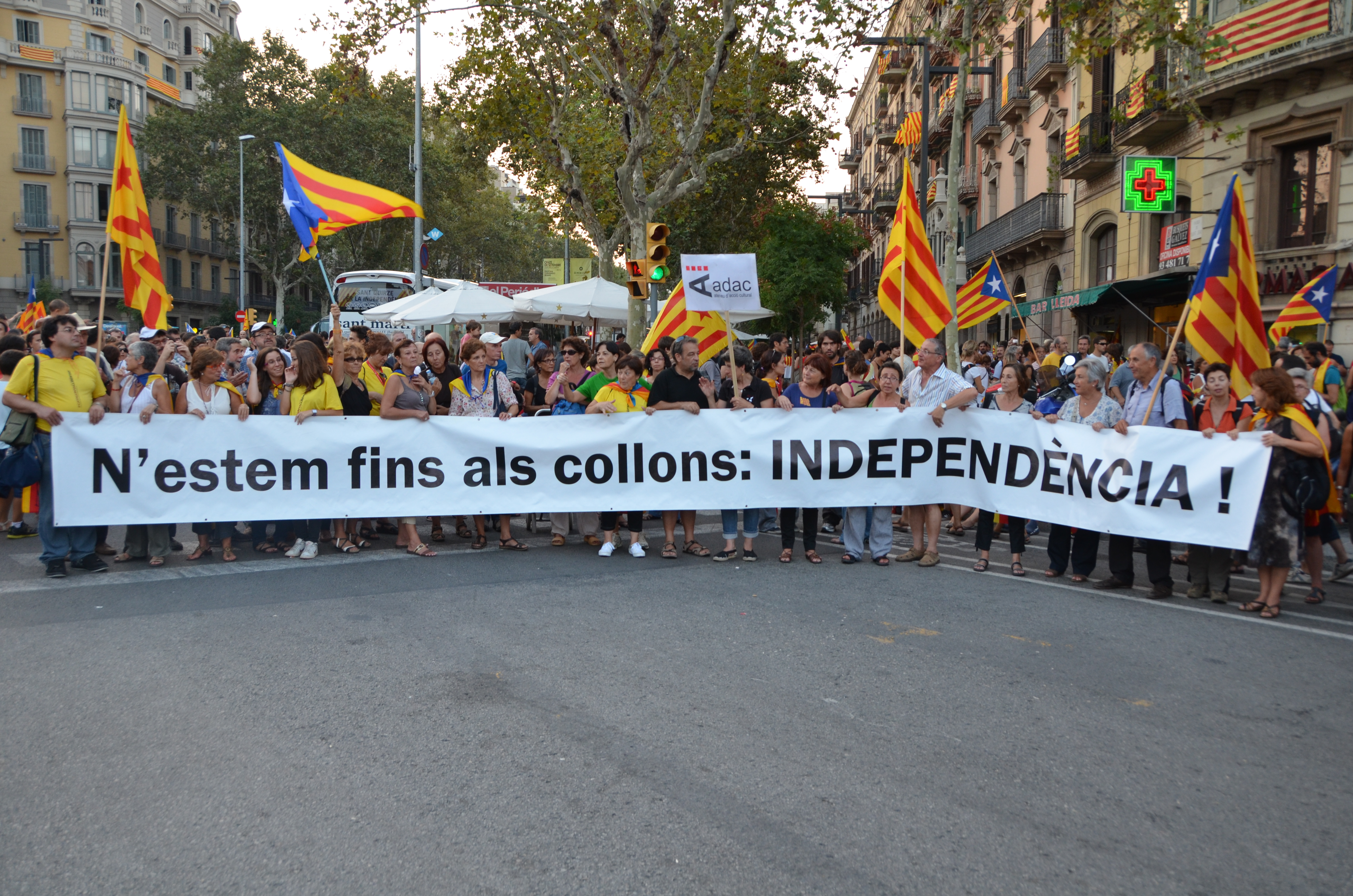 11s2012 N'estem fins als collons